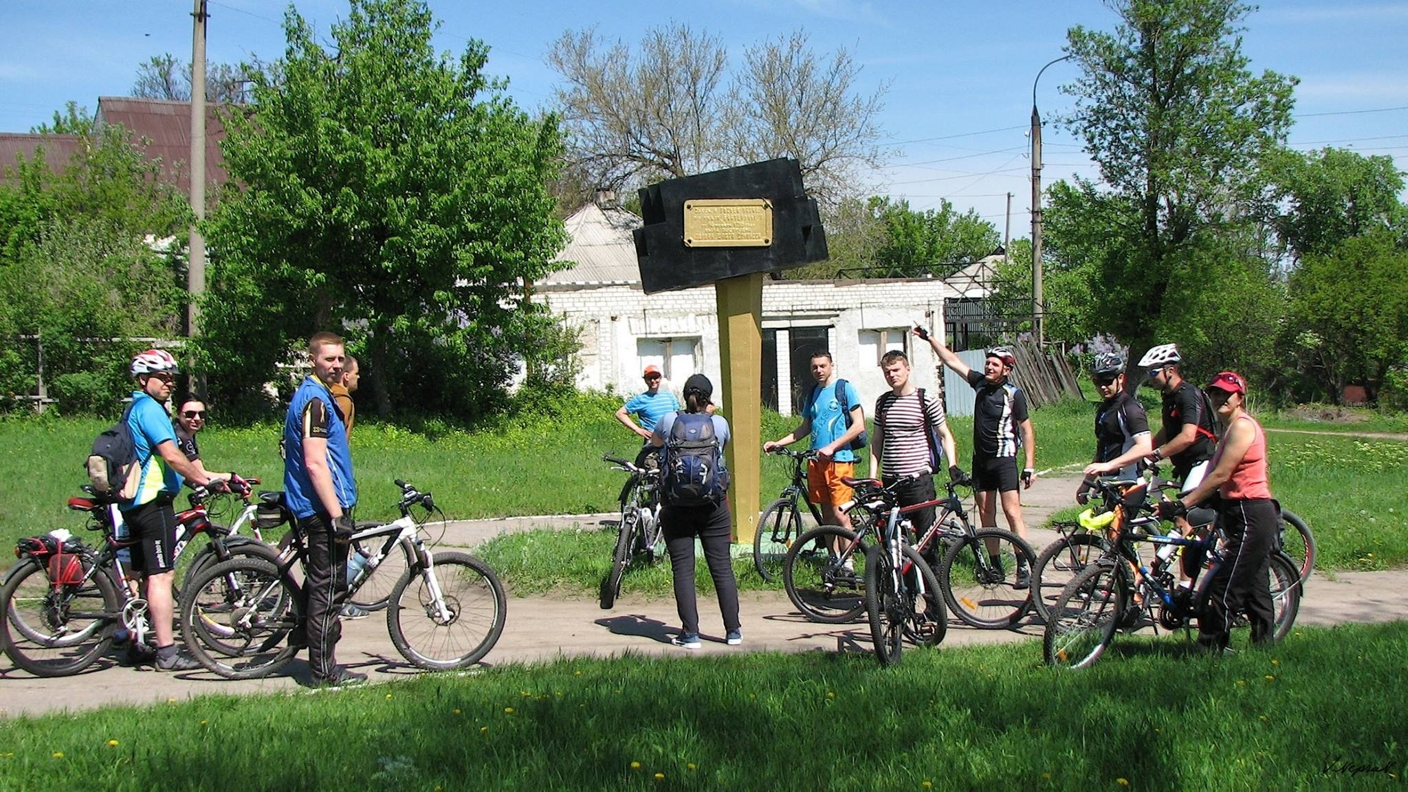 Велосипедисти Памятника першій шахті Донбаса